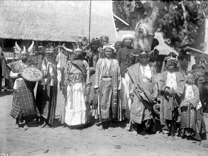 Negatief. Een dansgroep uit Galela, Halmahera